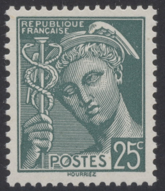 Vom Britischen Geheimdienst (PWE) gefälschte französische "Merkur-Marke" aus dem Jahr 1942.